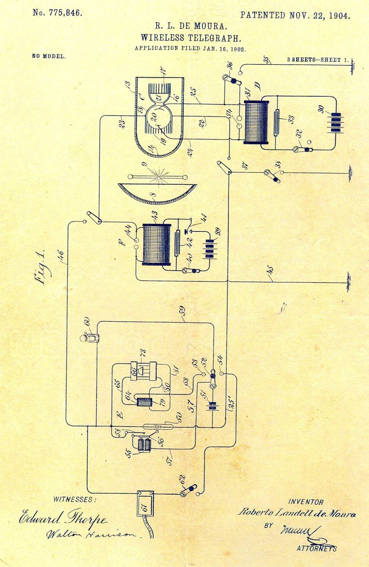 Diagrama Esquemático do Transmissor e Receptor de Telegrafia sem Fio - patente obtida em 1904 nos Estados Unidos por Roberto Landell de Moura